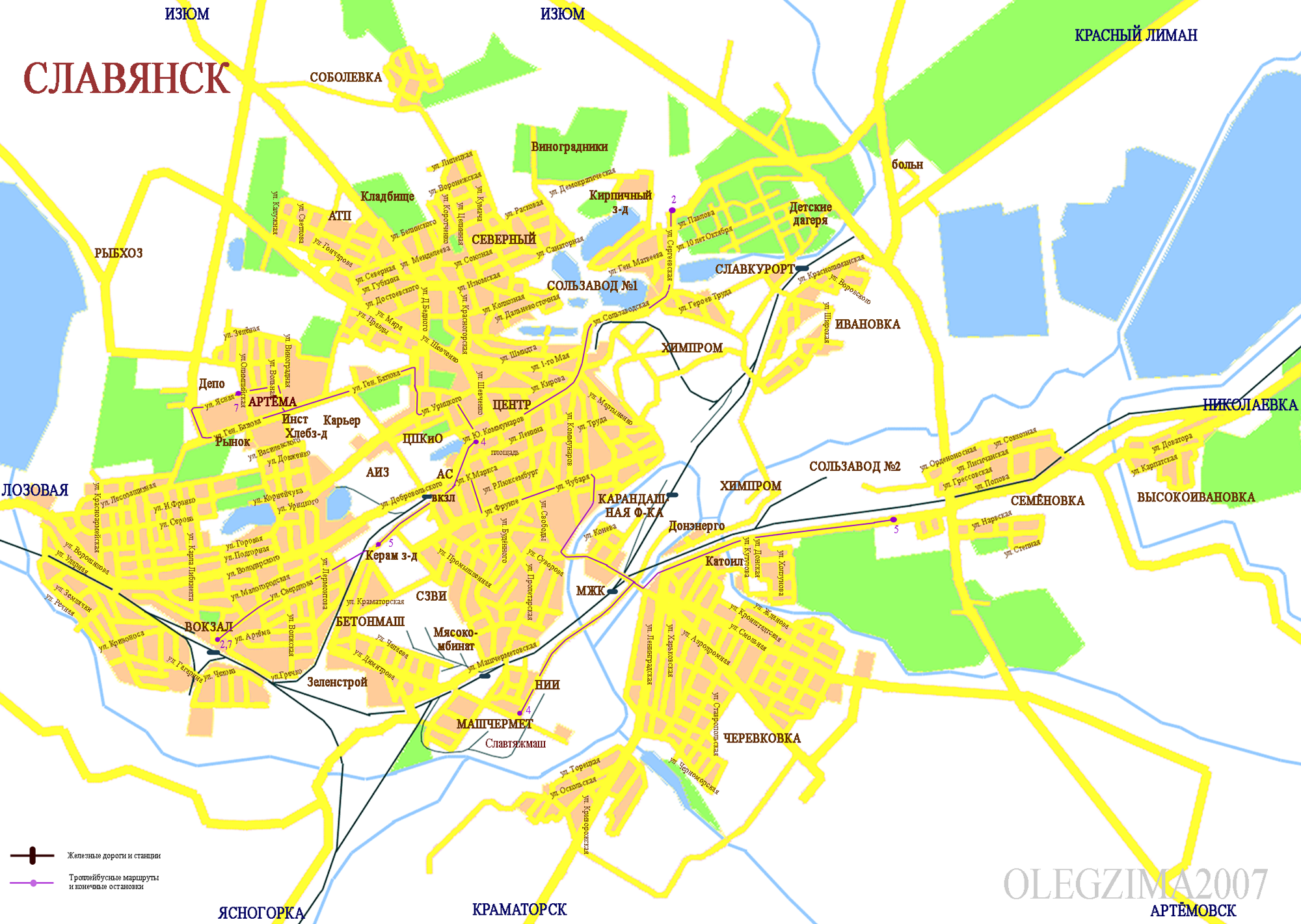 map of Slavyansk (Slovyansk city), Ukraine